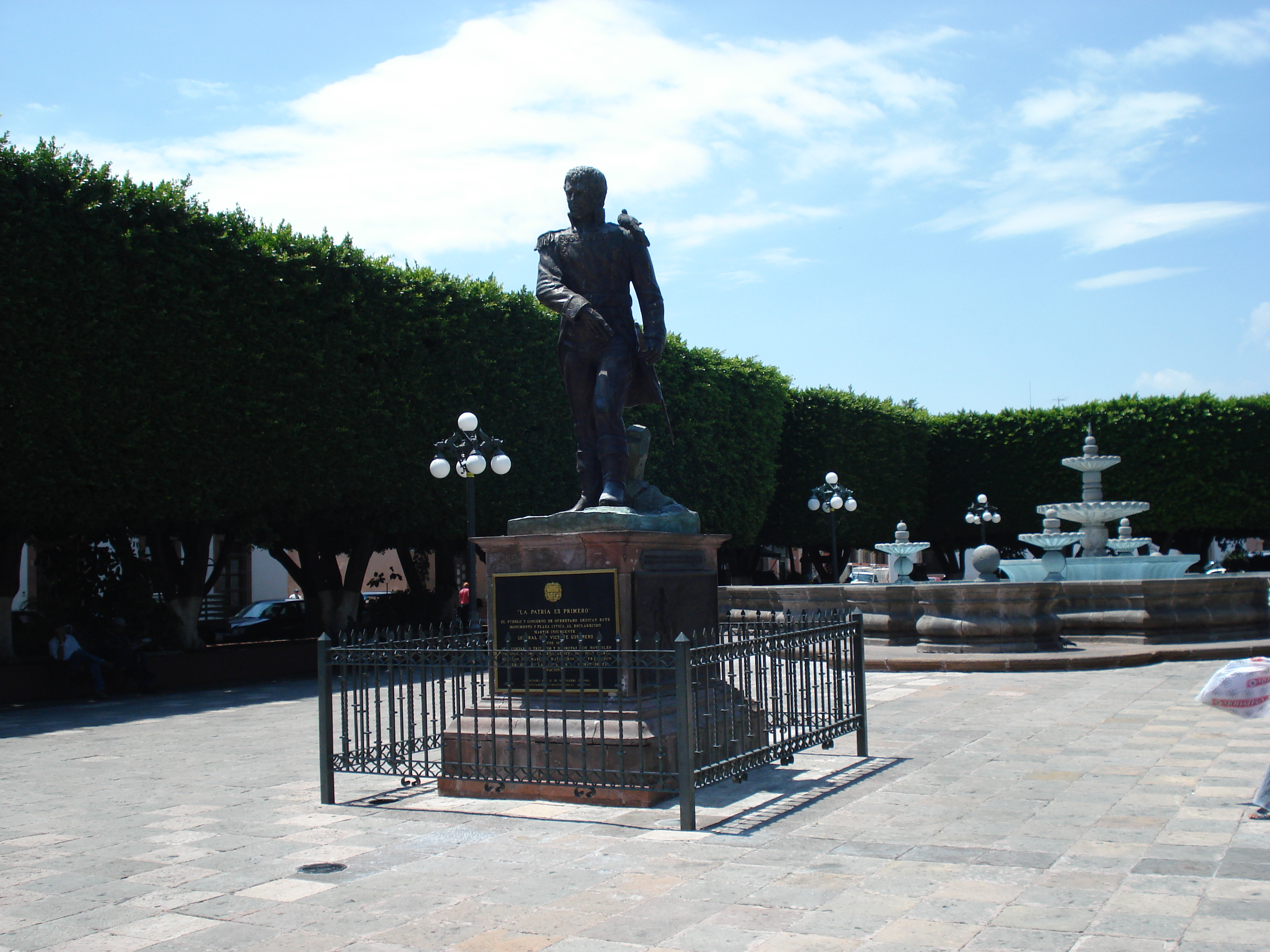 Jardin Guerrero